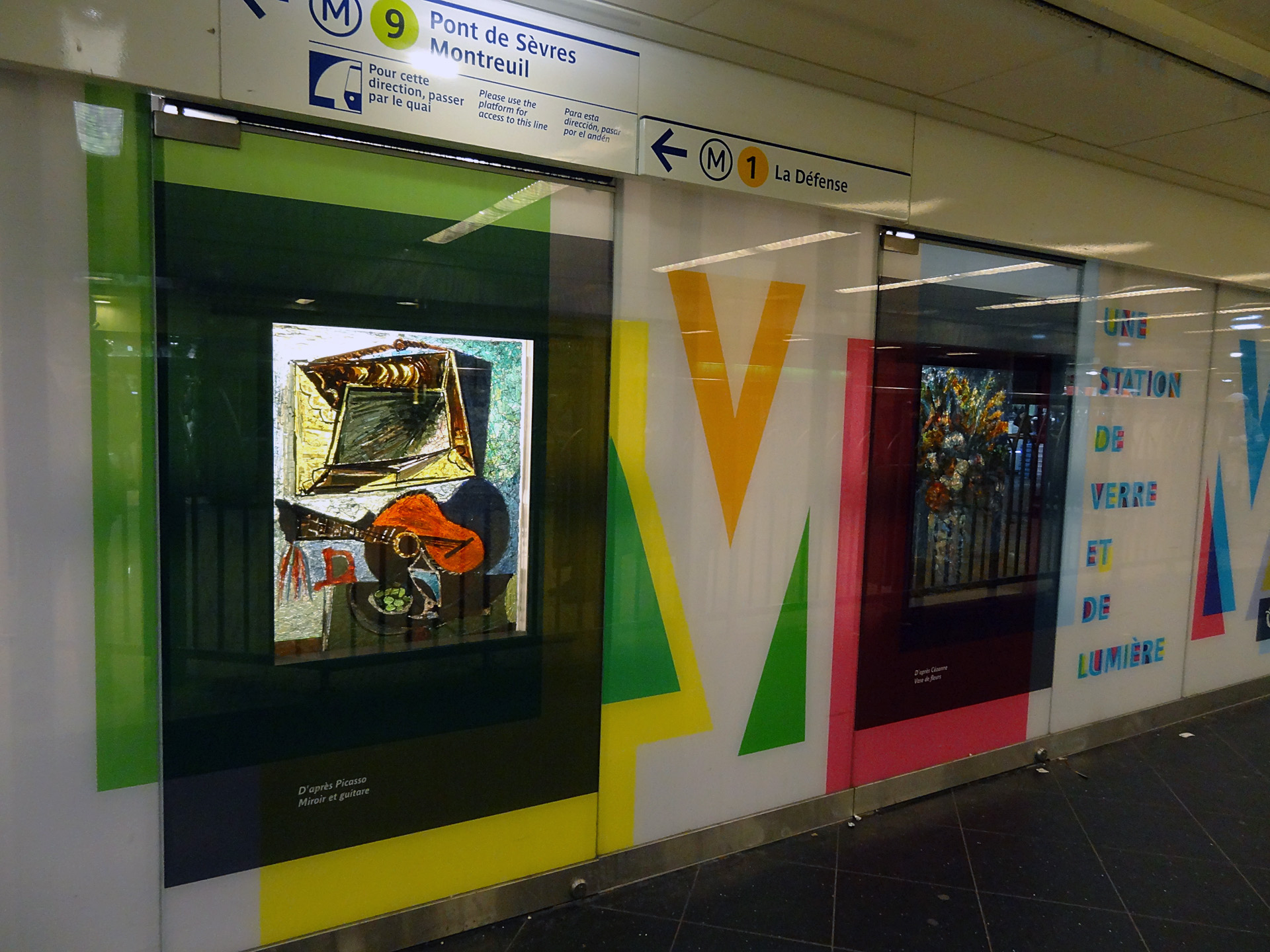 Gemmaux dans la salle des billets de la station Franklin D. Roosevelt du métro de Paris, France.